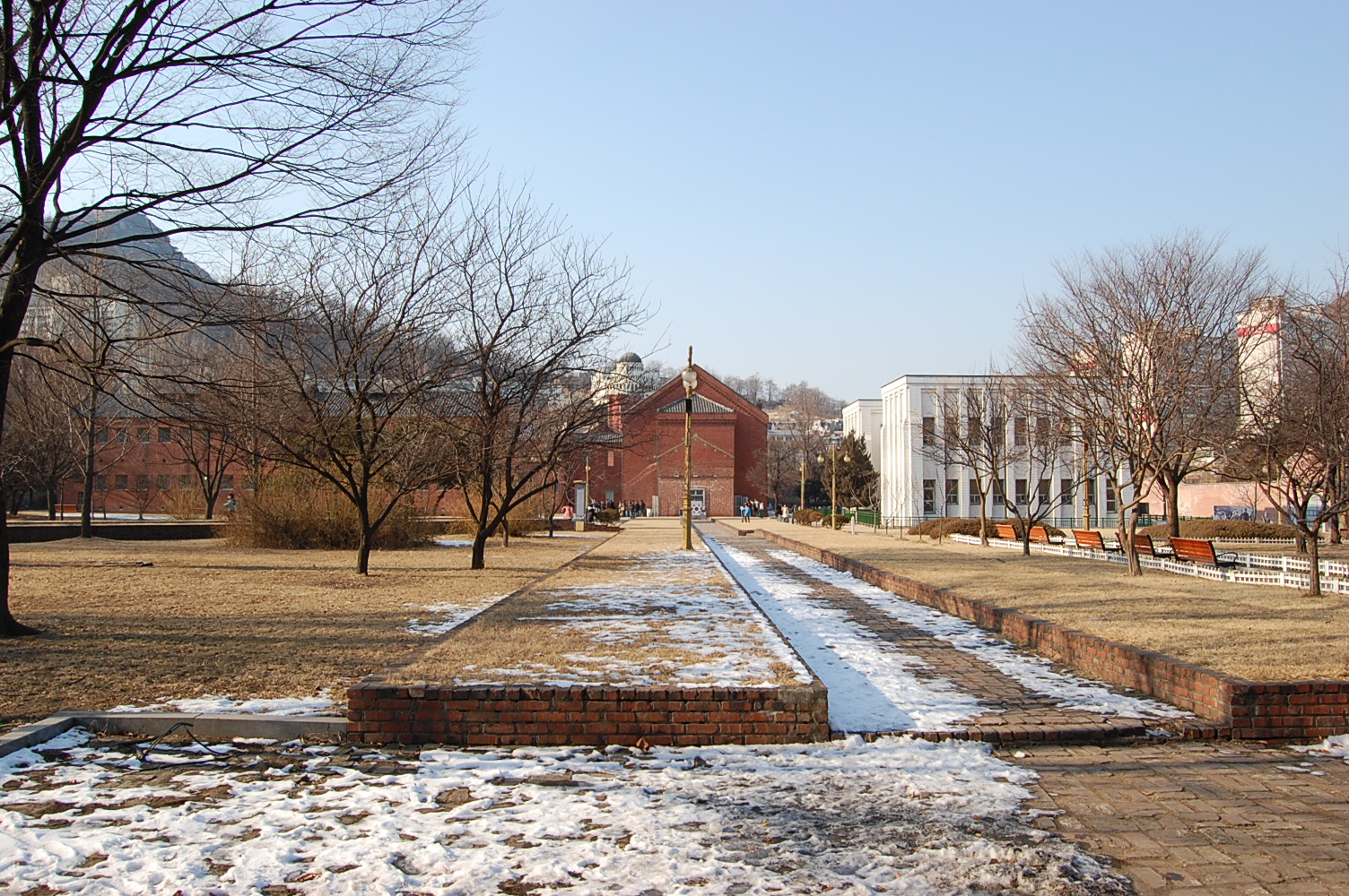 서대문 형무소 전경